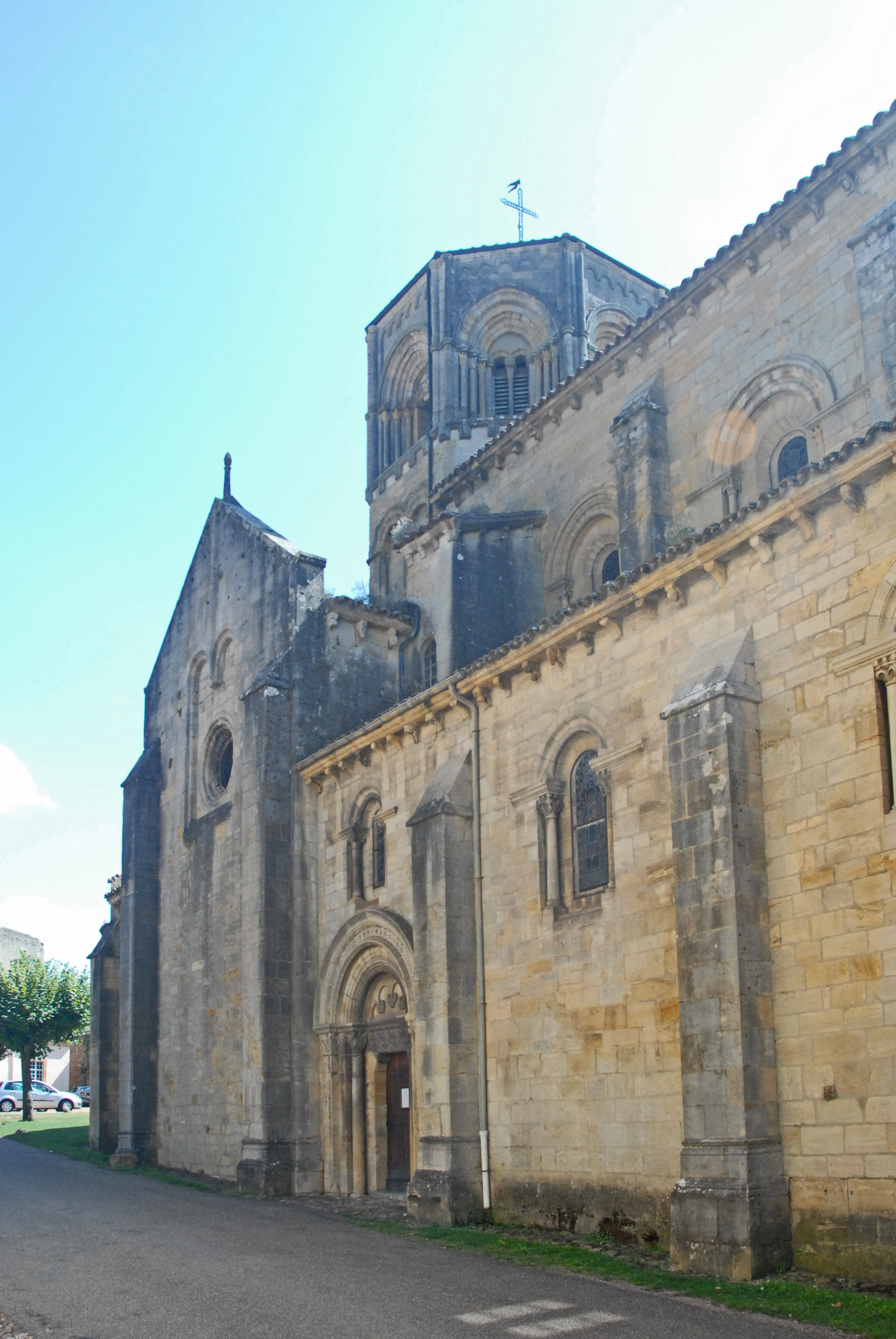 St-Hilaire de Semur-en-Brionnais, Lang- u. Querhaus von NW§